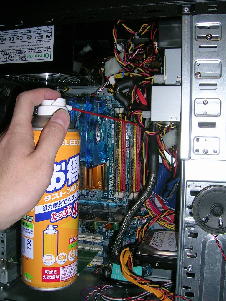 エアダスターでパソコン内部を清掃している様子